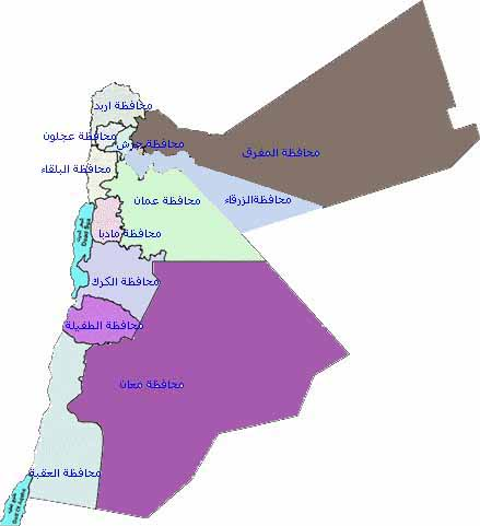 التقسيمات الإدارية في المملكة الأردنية الهاشمية. حيث تظهر المحافظات على الخارطة